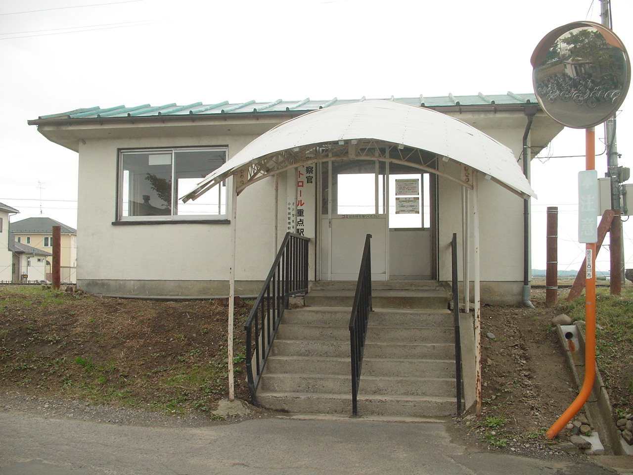 （塚目駅）